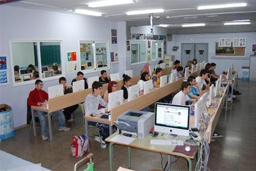 Aula d'arts gràfiques de l'Esteve Terradas